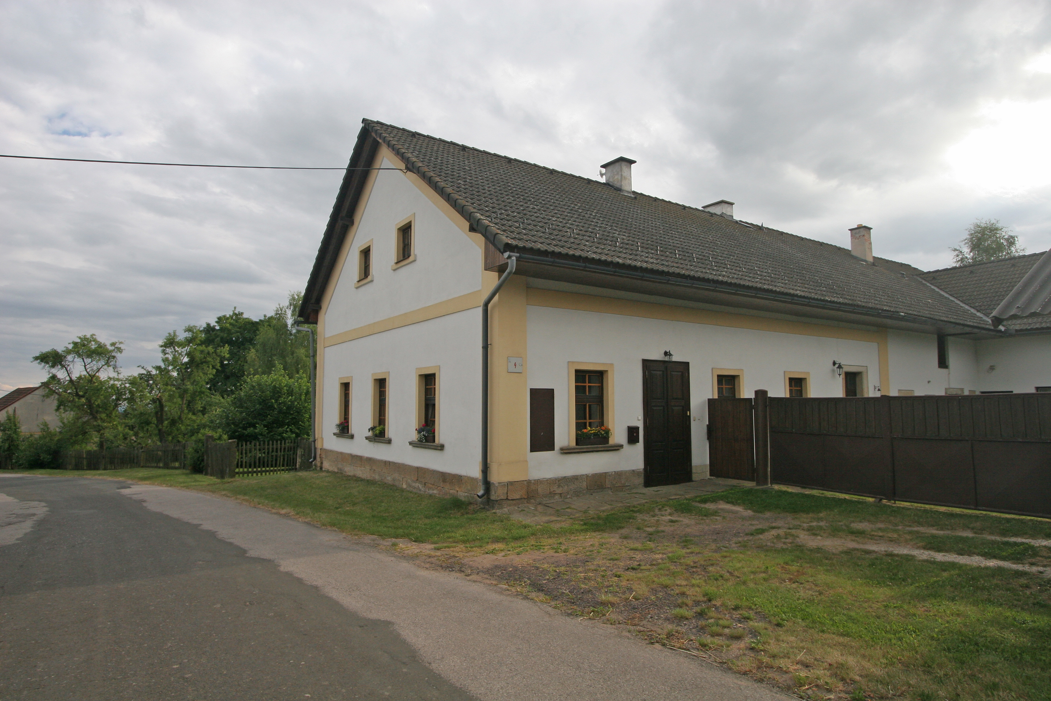 Skála čp. 1